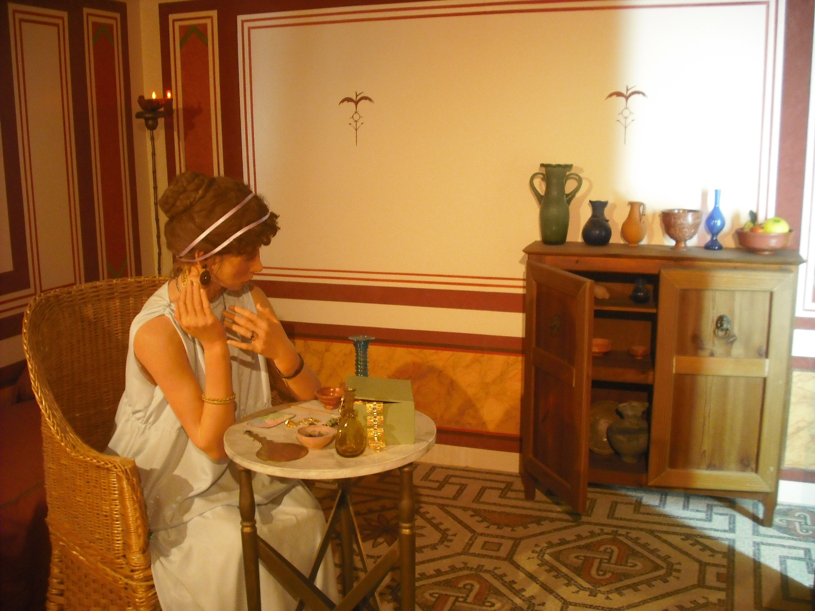 Maqueta de la villa romana del Palmeral al Museu del Mar.